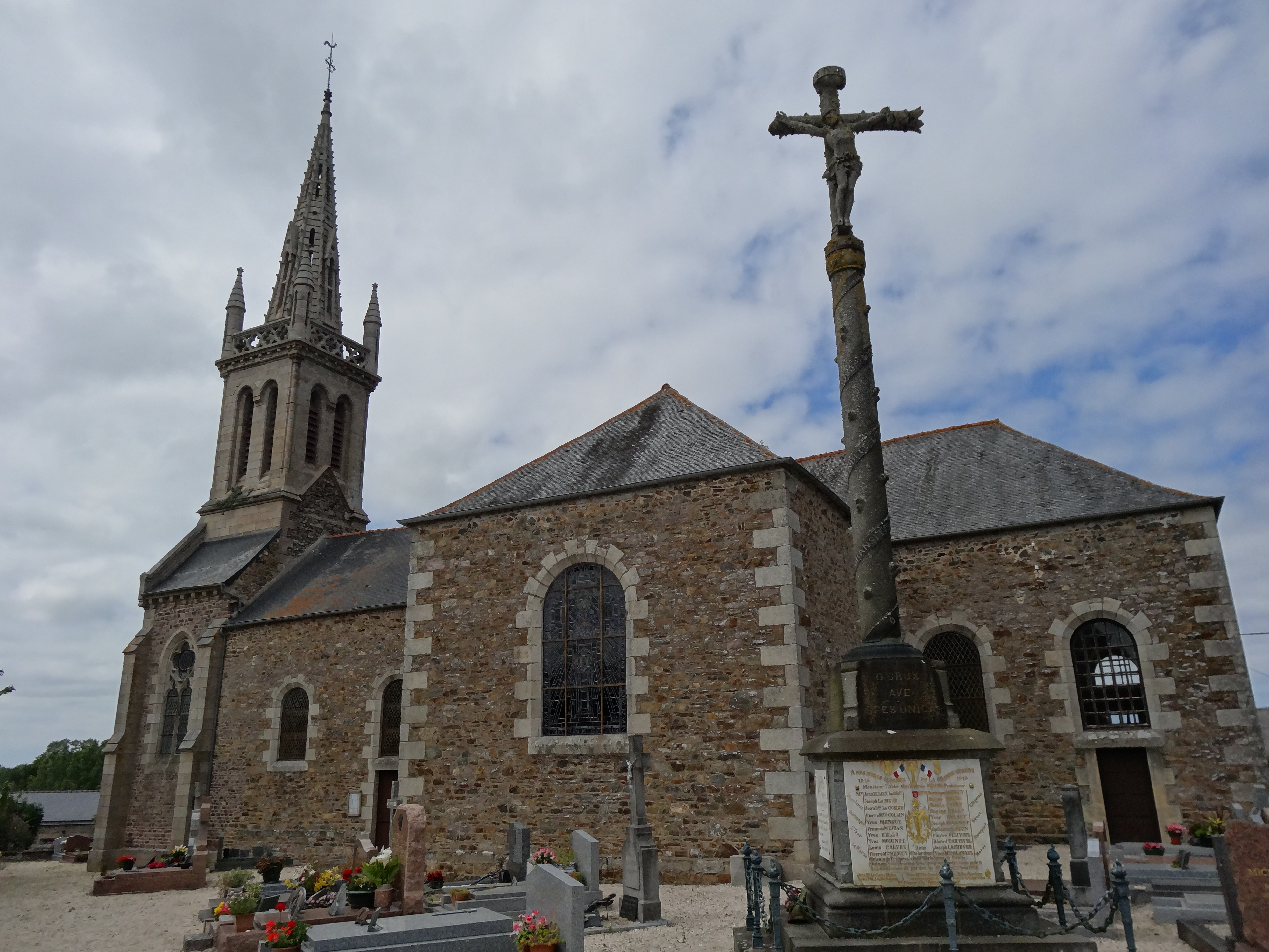 Tréméven (22) La croix de cimetière au fût à écots sert également de monument aux morts